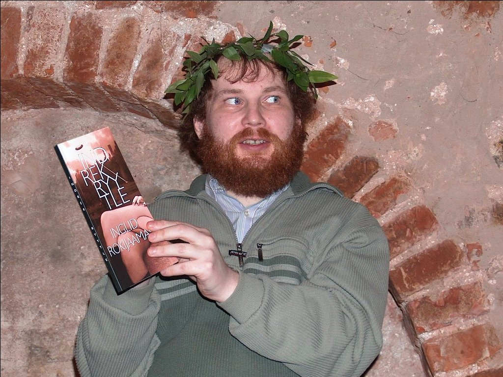 Indrek Ryytle 2006. aastal Tartus Tampere majas oma luulekogu "Inglid rokijaamas" esitlemas